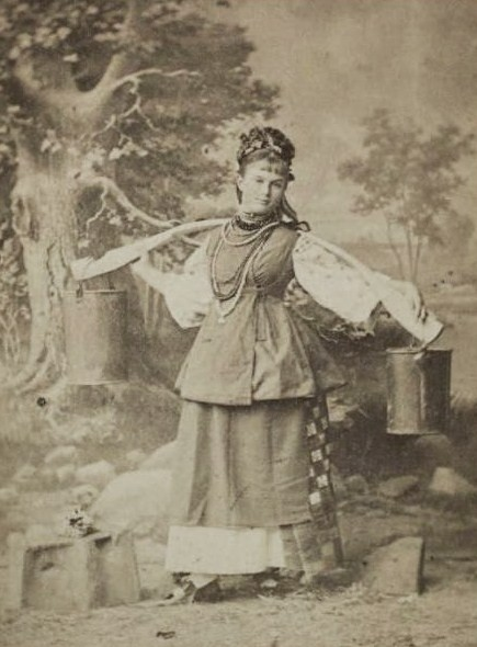 Княгиня Лобанова-Ростовская Людмила Григорьевна (1860-1932)